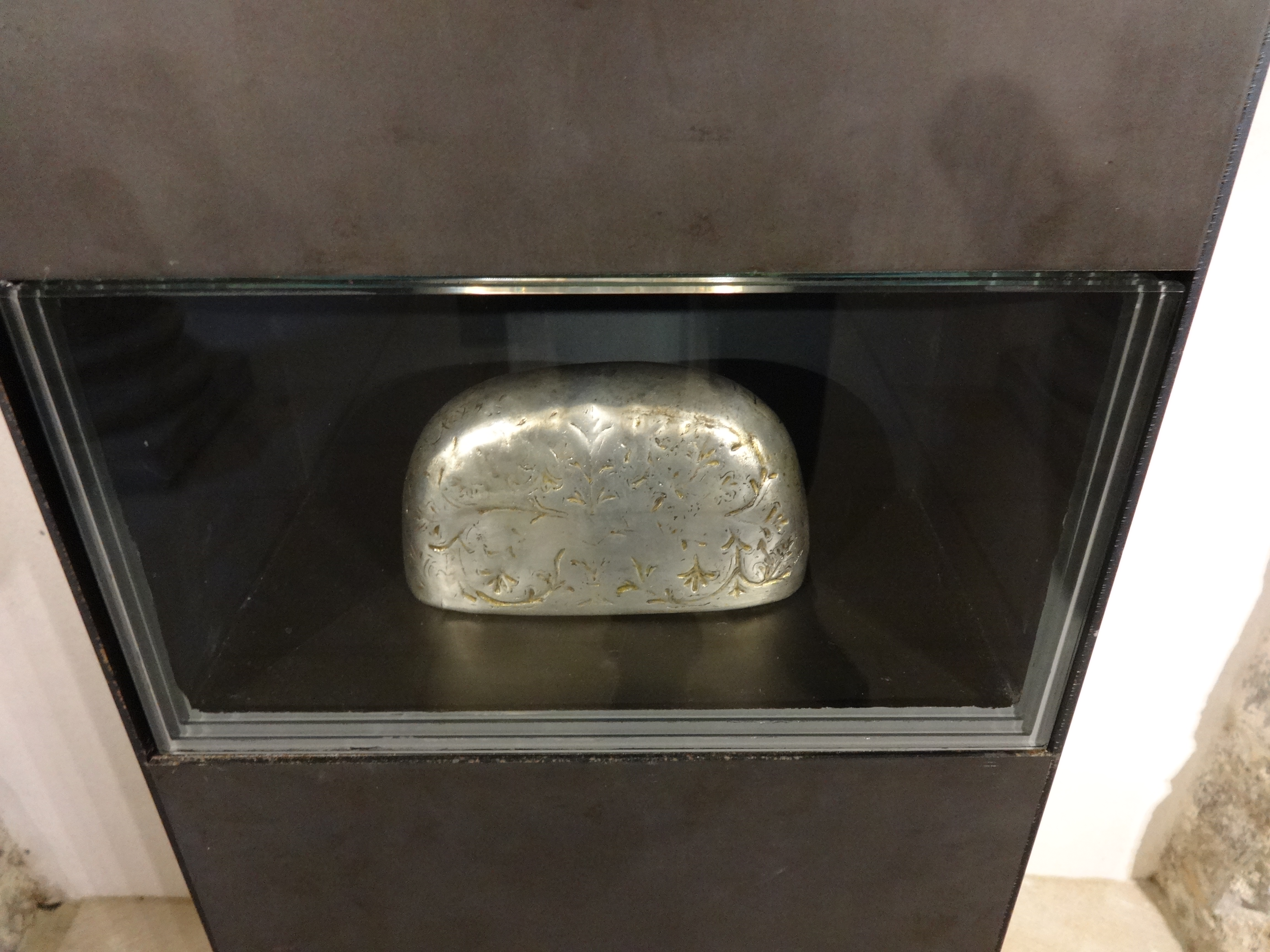 Hildesheimer Dom, Krypta, Marienreliquiar